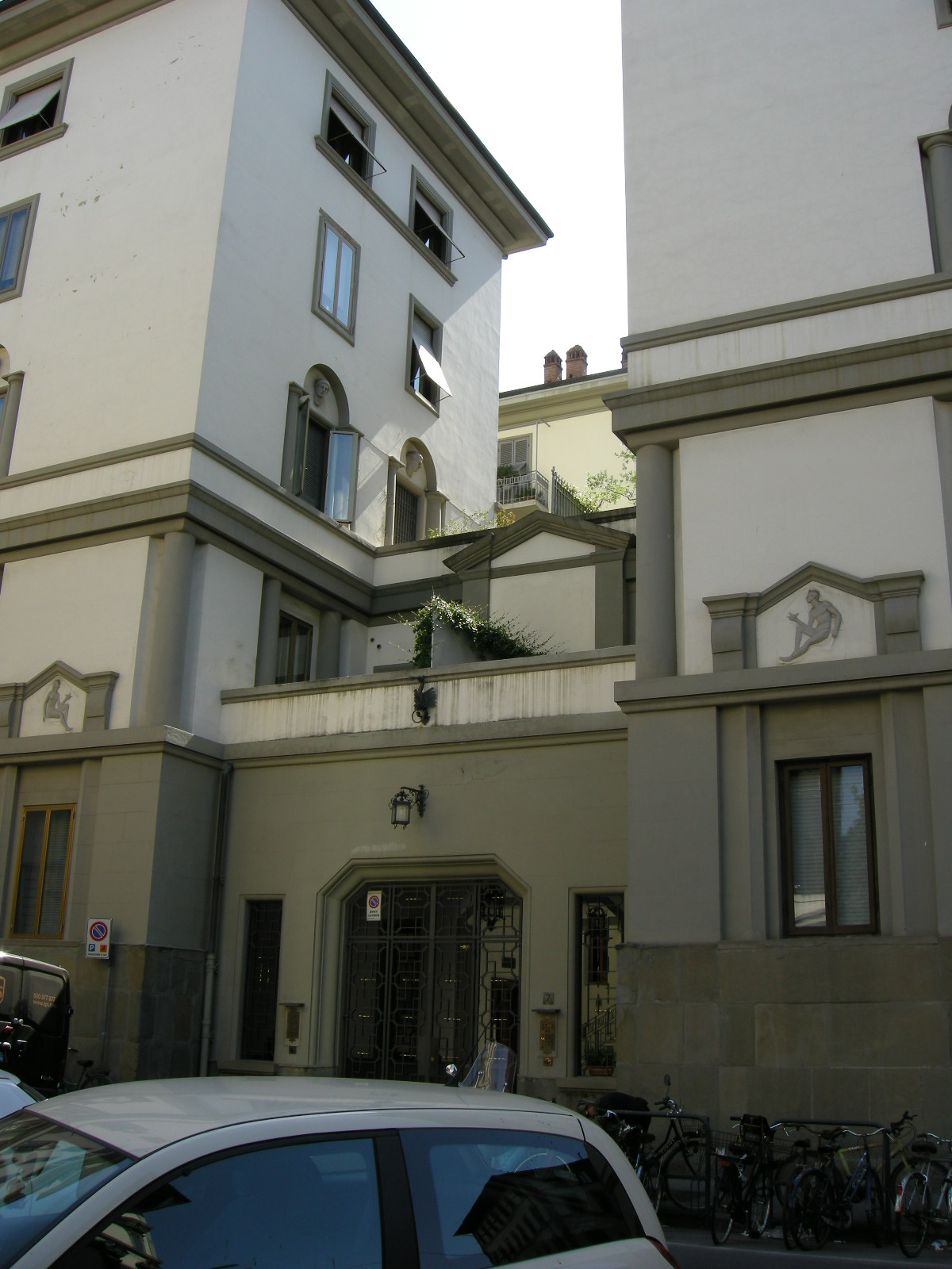 Alloggi per dipendenti governativi di via Crispi, ingresso